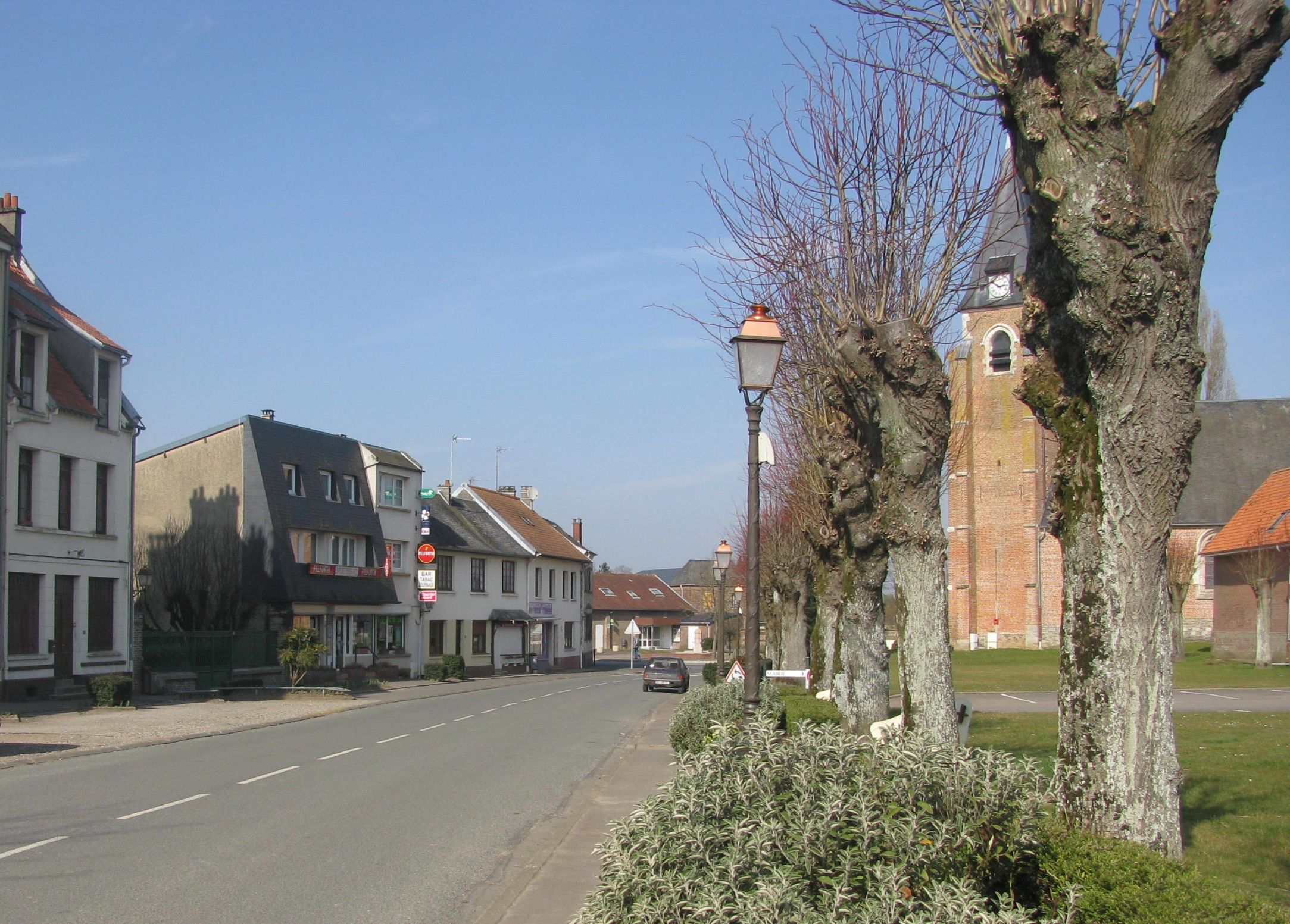 Centre du Village de Chepy